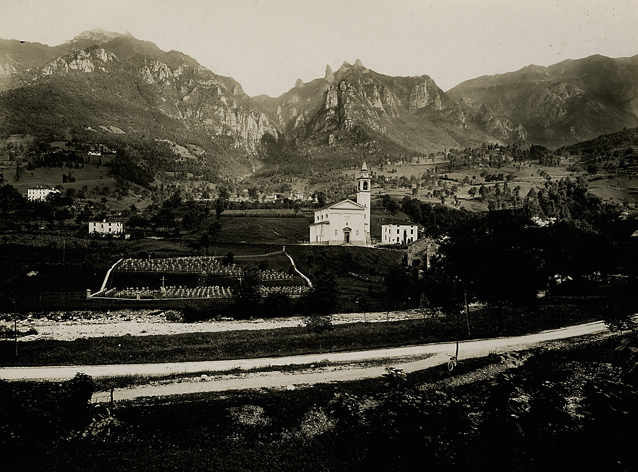 Fusine cimitero misto sfondo la Val di Rio. A sx il Priaforà, al centro il Monte Vacarezze con la sua torre a destra.